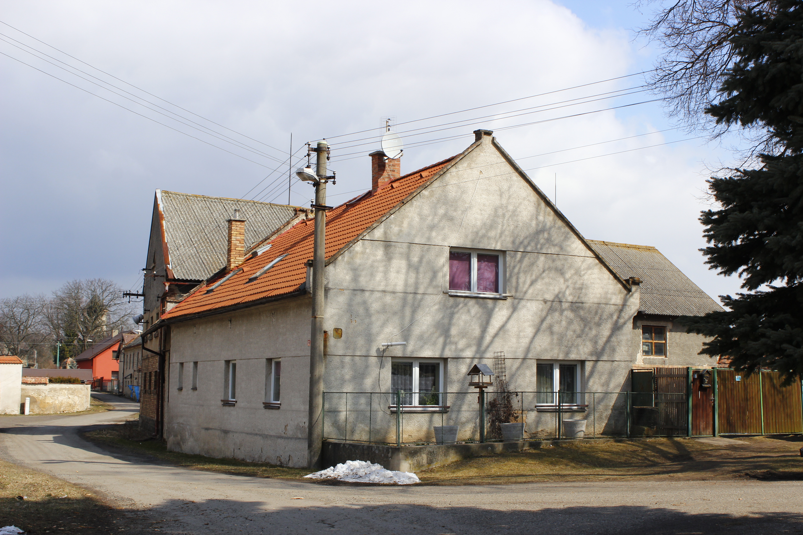 Dům číslo popisné 17 v Rokytovci.